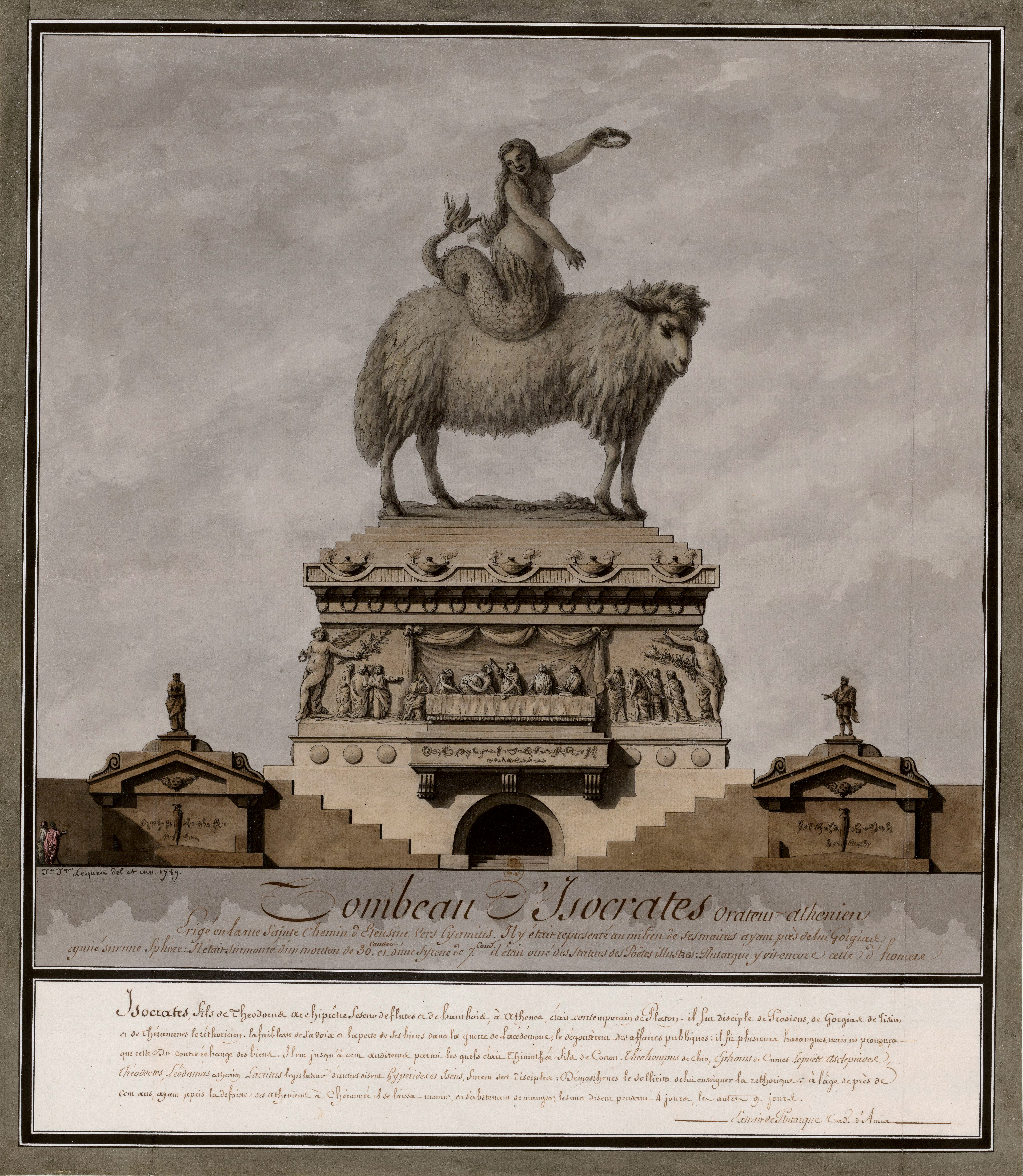 Dessin